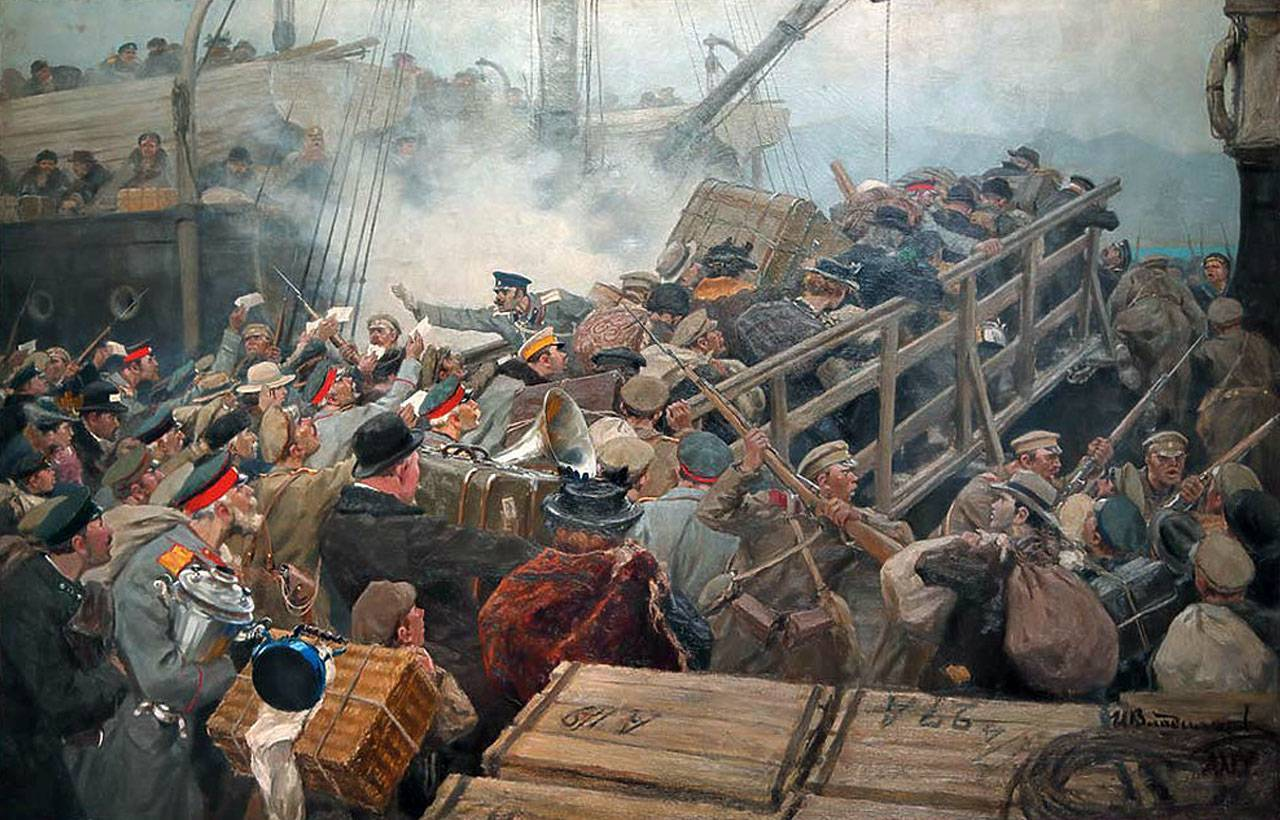 Картины художника Ивана Владимирова (1870-1947)